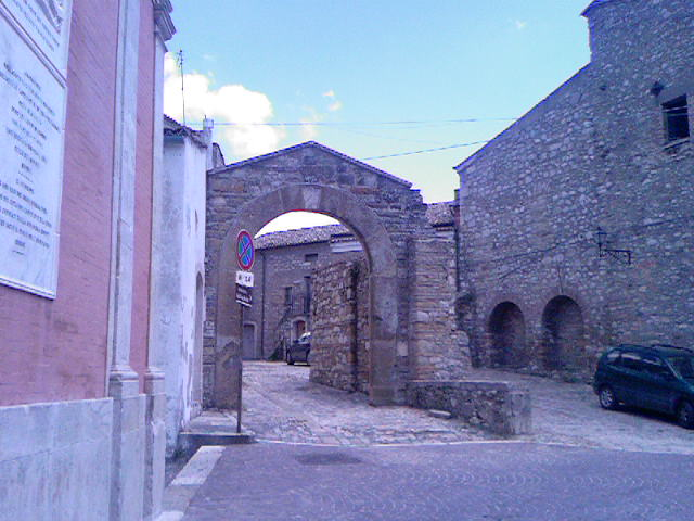 Caratteristico arco in Piazza dell'Orologio ad Accadia